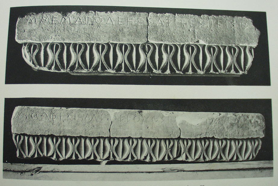 Fotografia della cornice dell'altare di Pisistrato, 512-511 a.C. FONTE: U. WILAMOWITZ et al., Inscriptiones Graecae, Berlin 1902. La fotografia è stata pubblicata per la prima volta sullo American Journal of Archaeology; l'opera è oggi caduta in pubblico dominio.